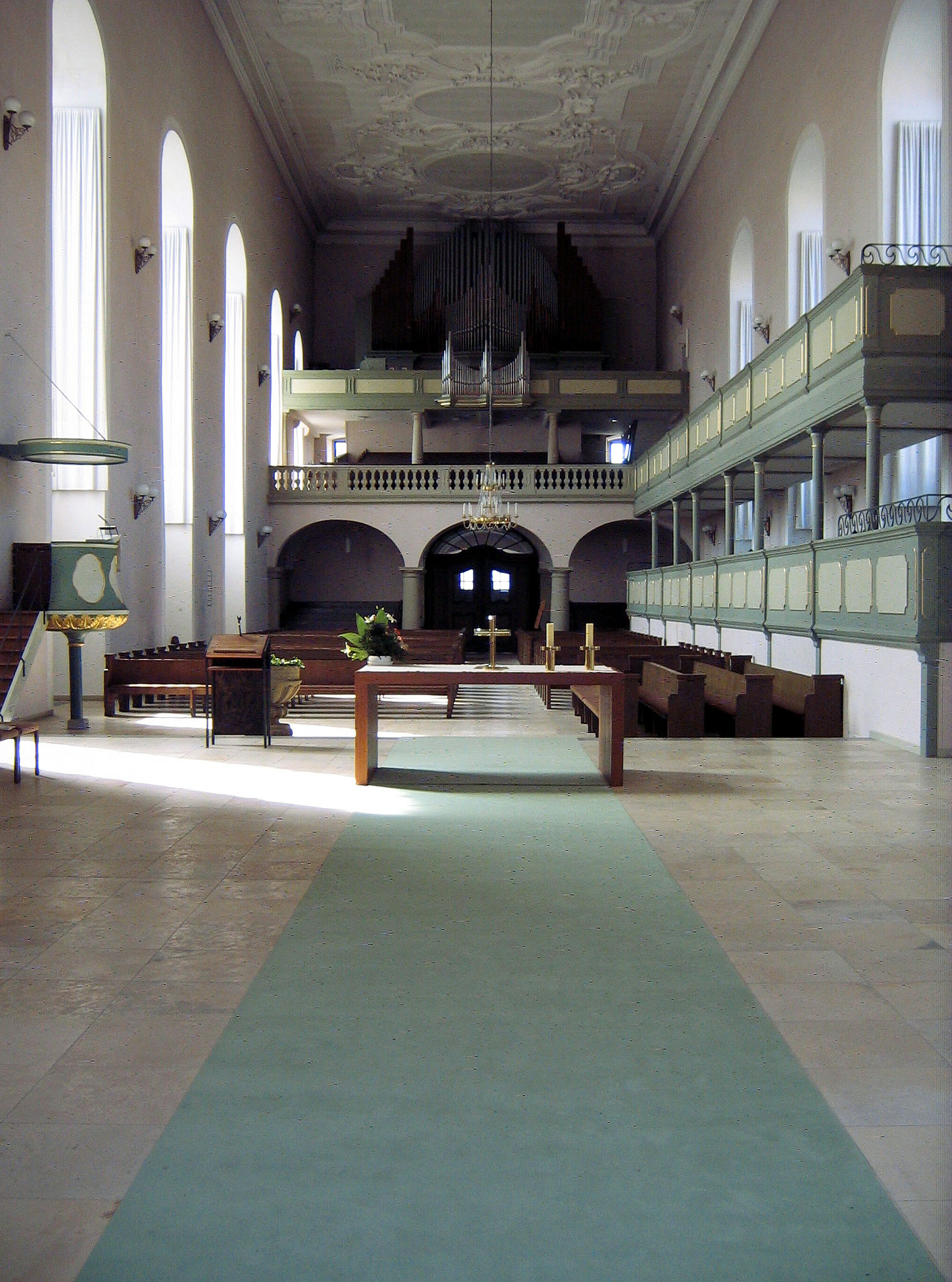 Innenansicht der Petrinikirche (Stadtkirche) mit der großen Steinmeyer Orgel, Kitzingen / Main